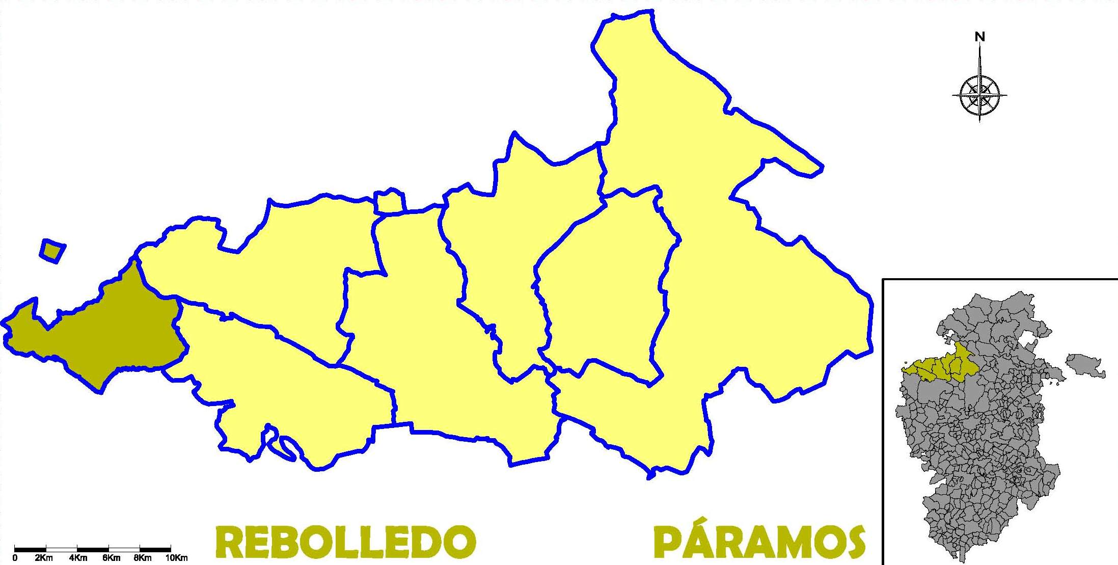 Situación del municipio de Rebolledo de la Torre en la comarca de Páramos, provincia de Burgos